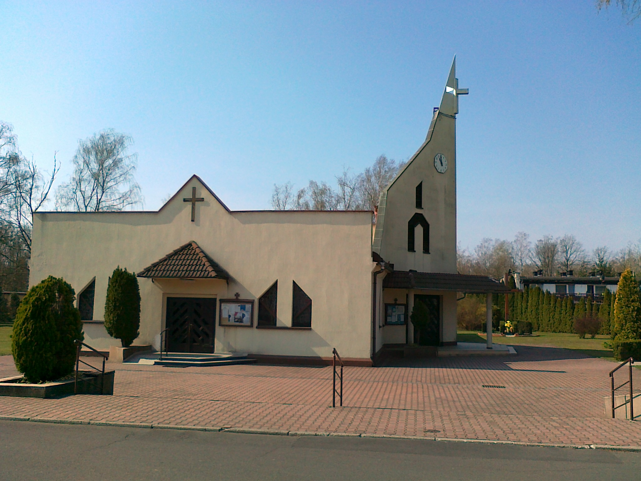 Kościół Świętego Floriana w Kędzierzynie-Koźlu